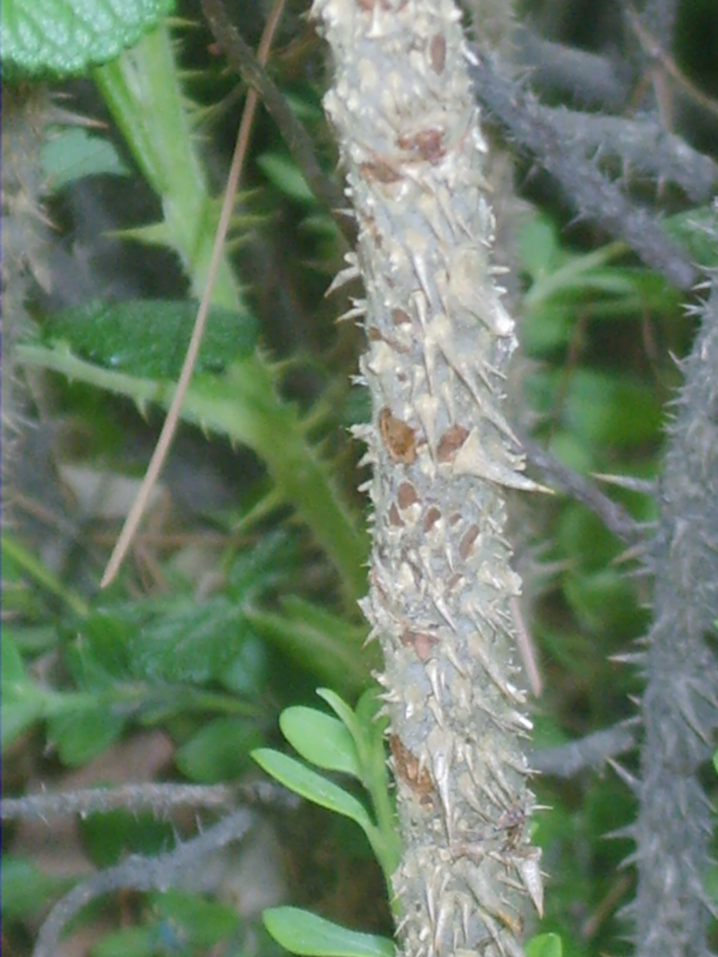 Rosa rugosa in Bupyung Korea. 부평묘지공원 팔강정에 사는 해당화